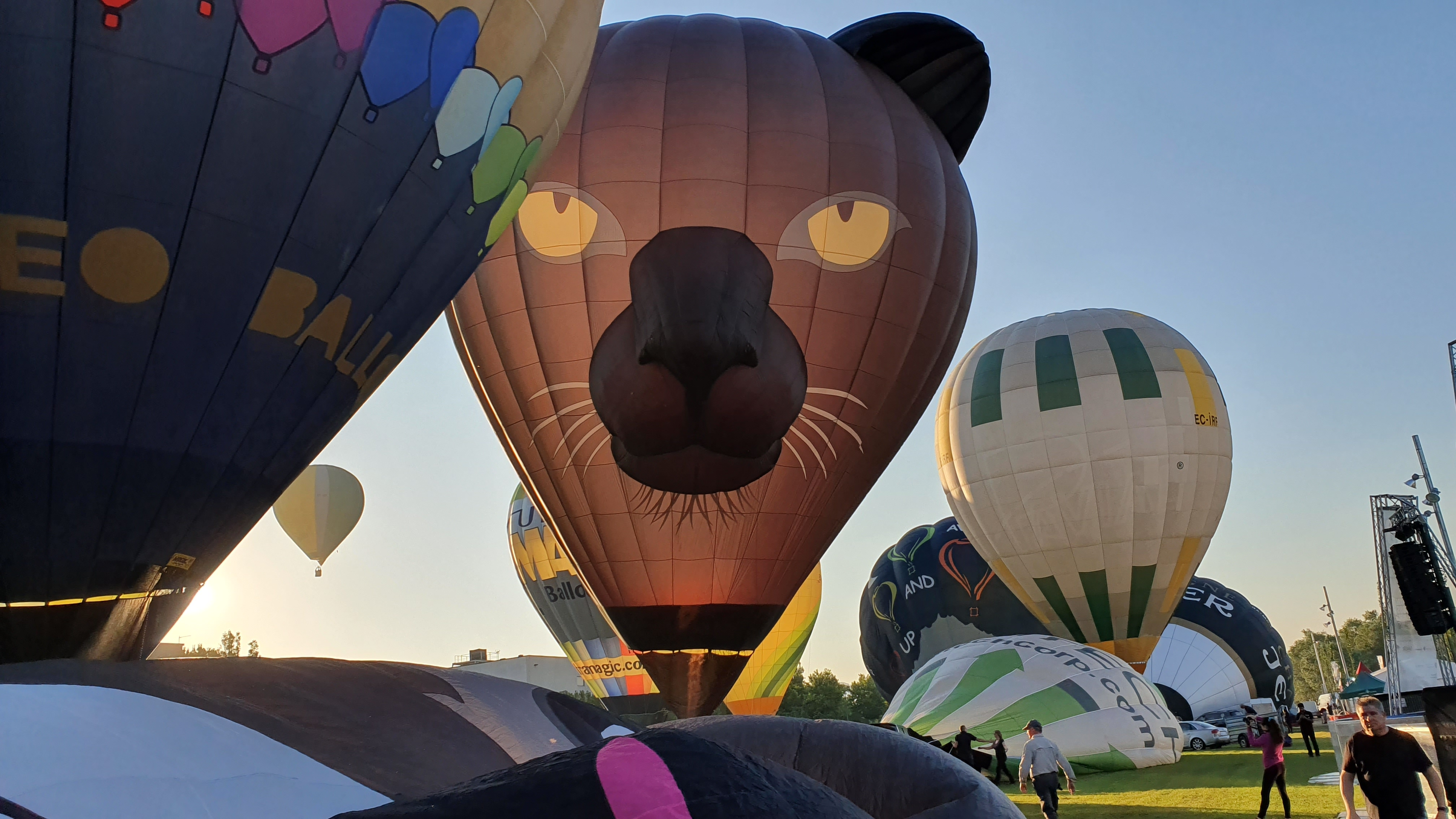 Vol de premsa, 11 de juliol de 2019. Globus en forma de pantera.